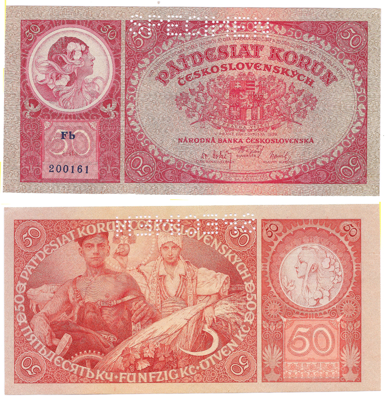 50 korun Česko-Slovenských z roku 1929